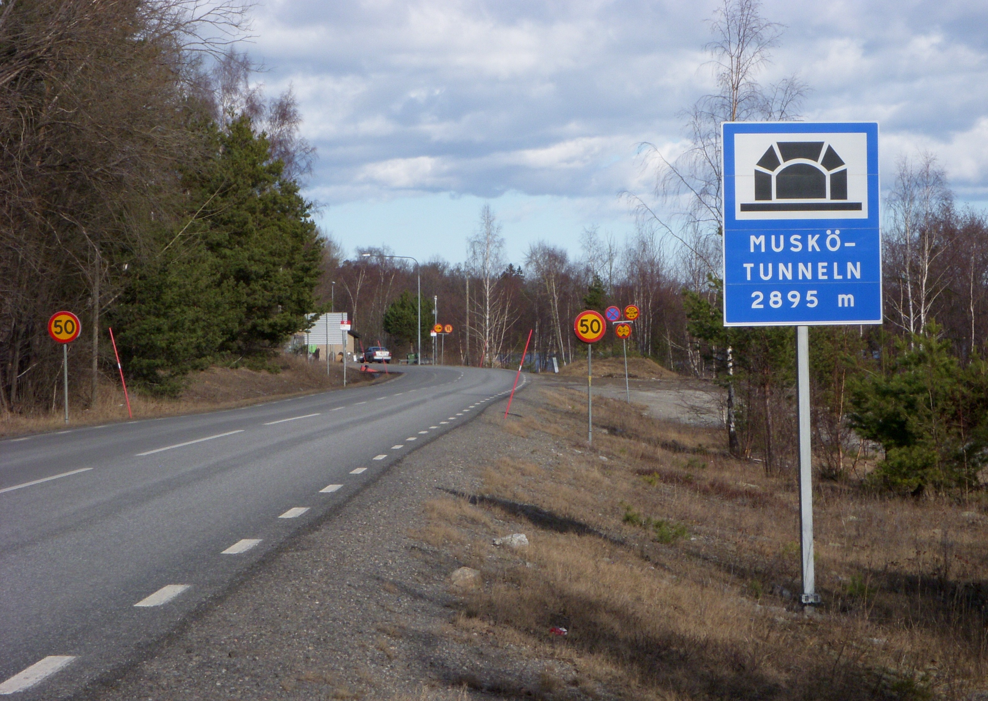 Muskövägen vid Muskötunnelns mynning på Yxlö